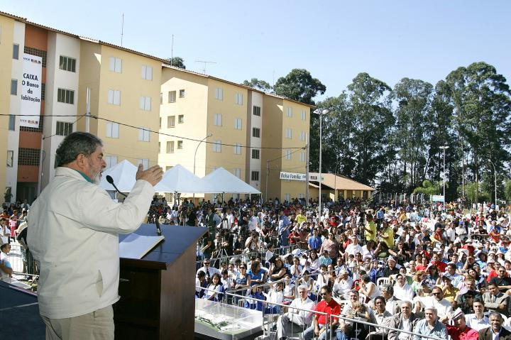 Diadema/SP - Presidente Lula discursa durante cerimônia de entrega de unidades habitacionais do Programa de Arrendamento Residencial - PAR, de certificados do Programa de Subsídio à Habitação - PSH, e de cartões do Programa Bolsa Família. Foto: Ricardo Stuckert/PR.